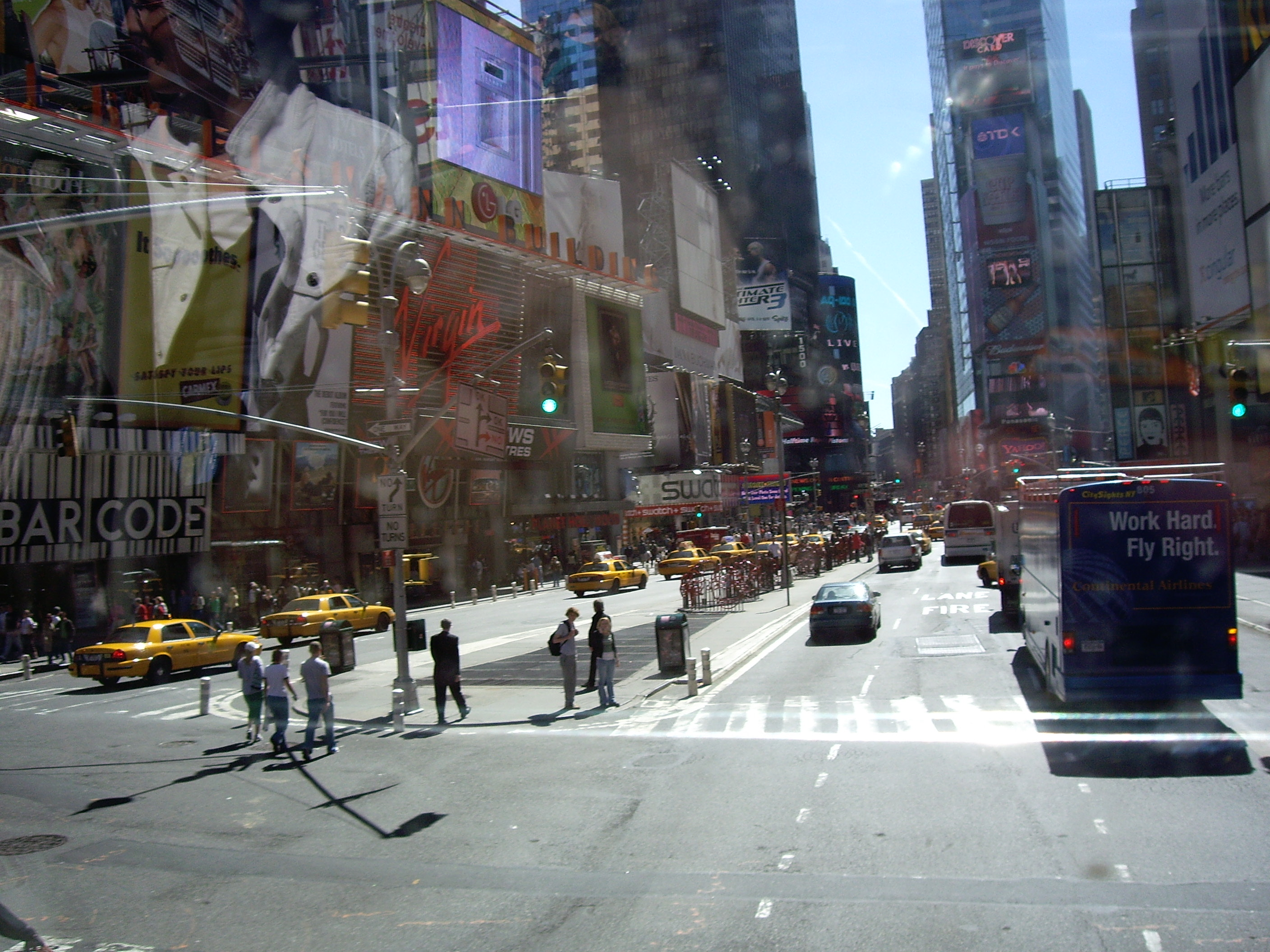 Her kan du sjå Times Square som ligg der Broadway og 7th Avenue kryssar kvarandre.